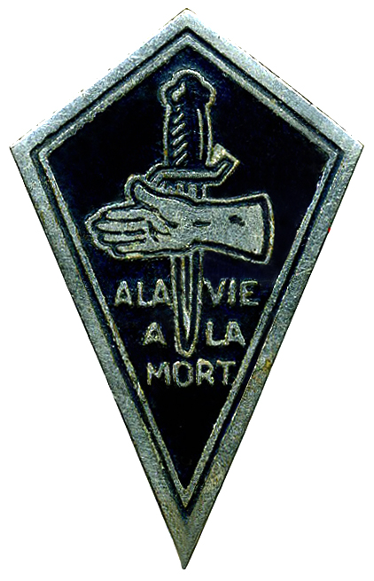 Insigne du Bataillon SAS Ponchardier (1945-46)